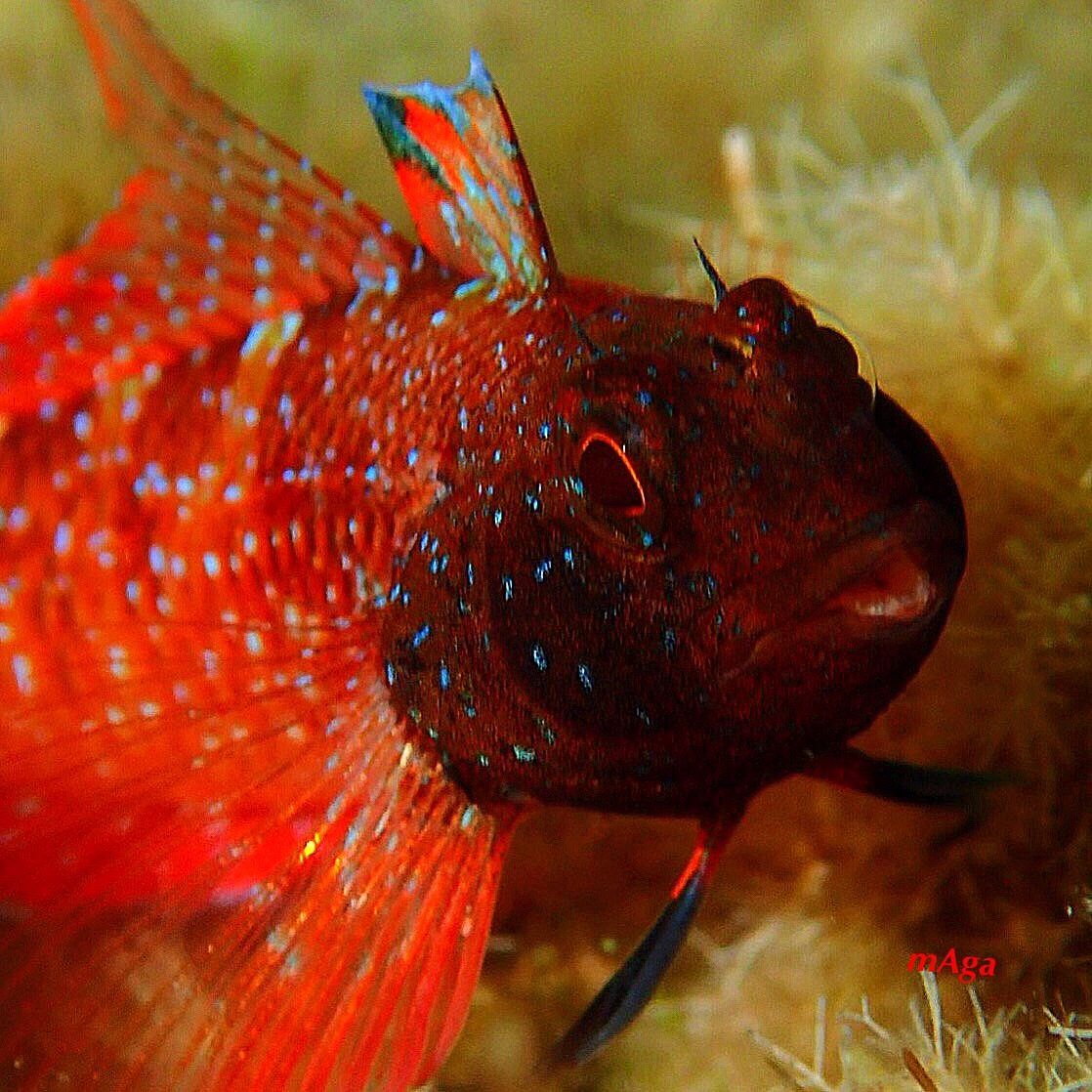 Κοινωνικος, αεικινητος και φωτογενης This is a photography of Natura 2000 protected area with ID GR4120005